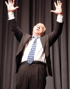 Richard Rogler